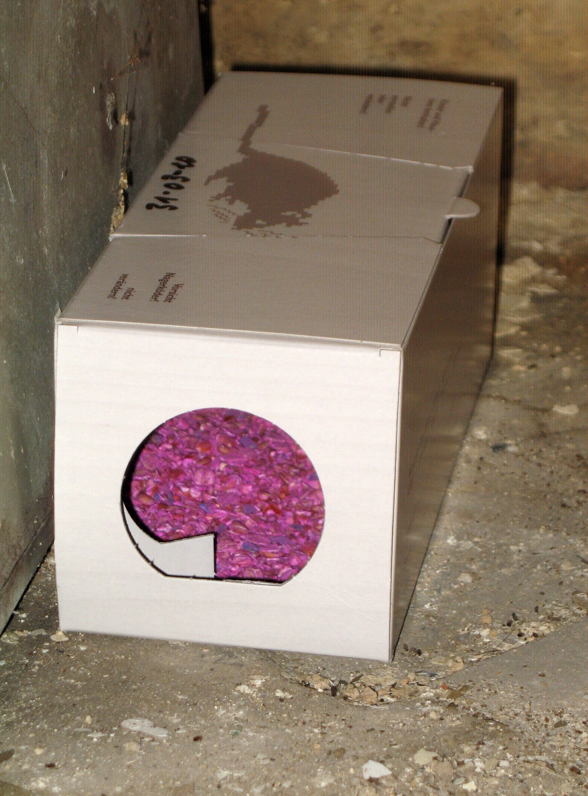 Pappbox mit Rattengiftköder